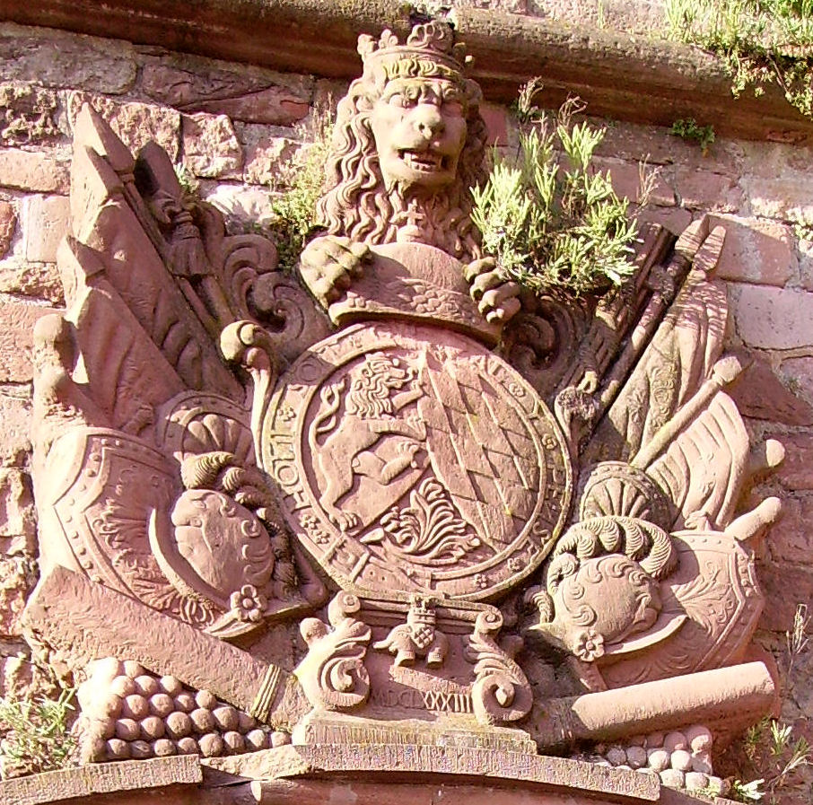 Kurpfälzisches Wappen am Heidelberger Schloss